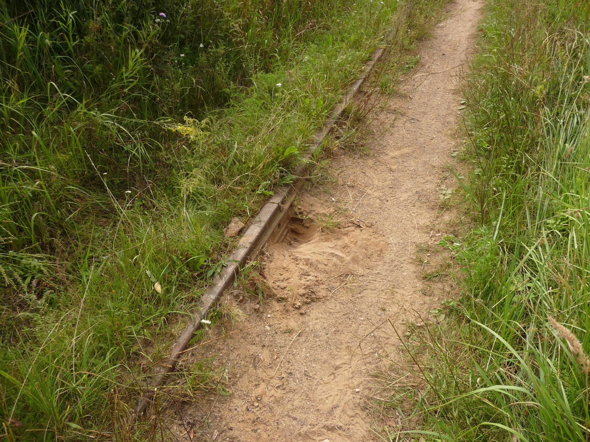 Остатки железнодорожного пути линии Псков-Нарва на бывшем перегоне Запсковье-Ваулино